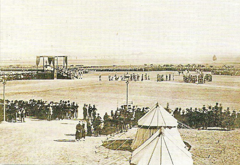 photographie du Camp de Châlons par Legray; des troupes et l'éclairage du camp.